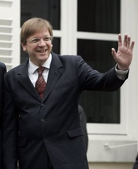 Belgian prime minister Guy Verhofstadt.